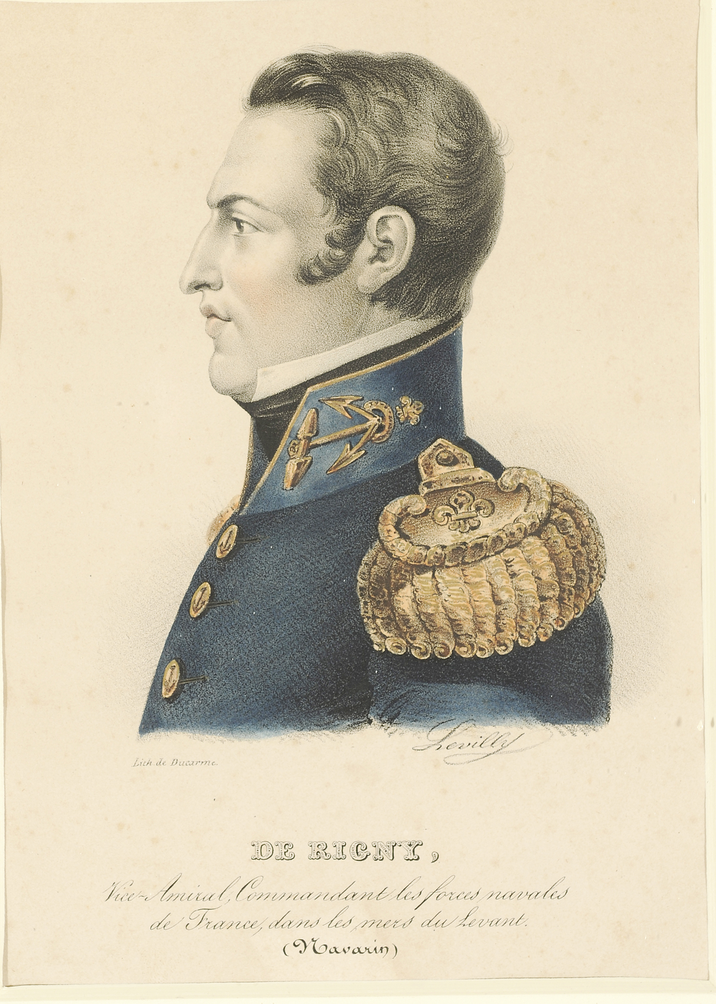 Ο Γάλλος ναύαρχος Δε Ριγνύ που έλαβε μέρος στη Ναυμαχία του Ναβαρίνου το 1827. Επιζωγραφισμένη λιθογραφία του Levilly. Εθνικό Ιστορικό Μουσείο, Συλλογή Χαρακτικών. (893).